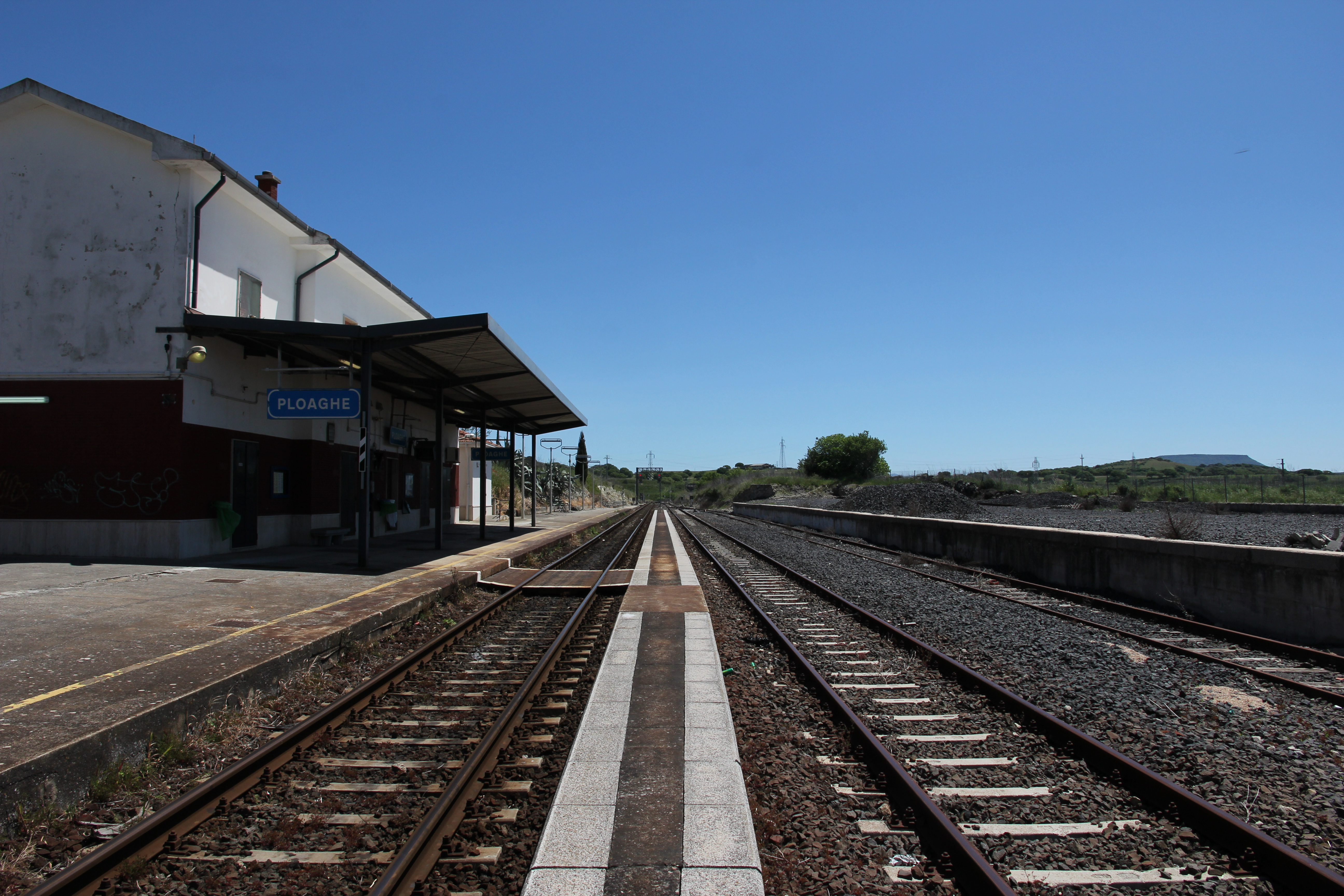 Ploaghe - Stazione ferroviaria